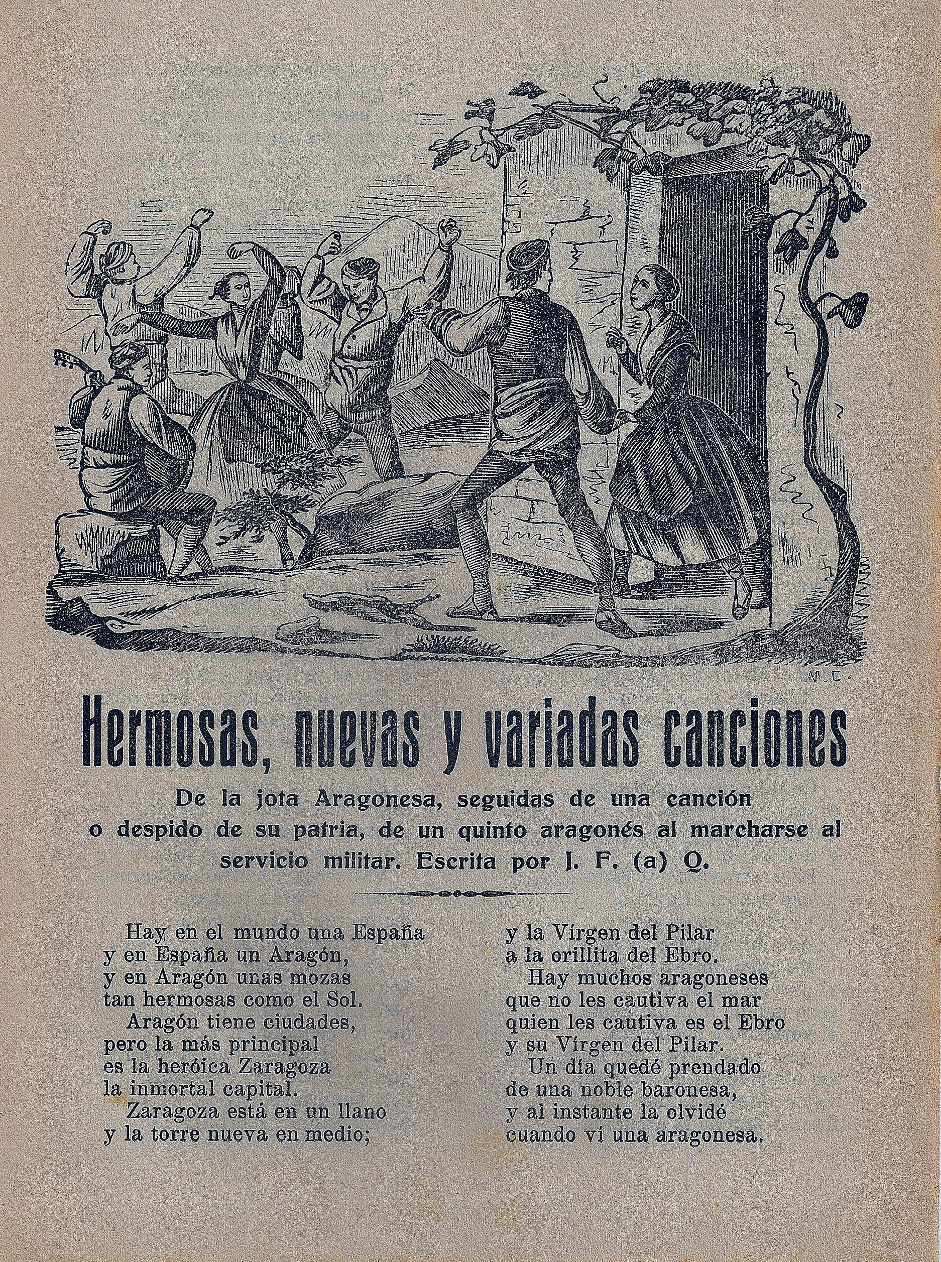 Primera pàgina d'un romanço del Queri